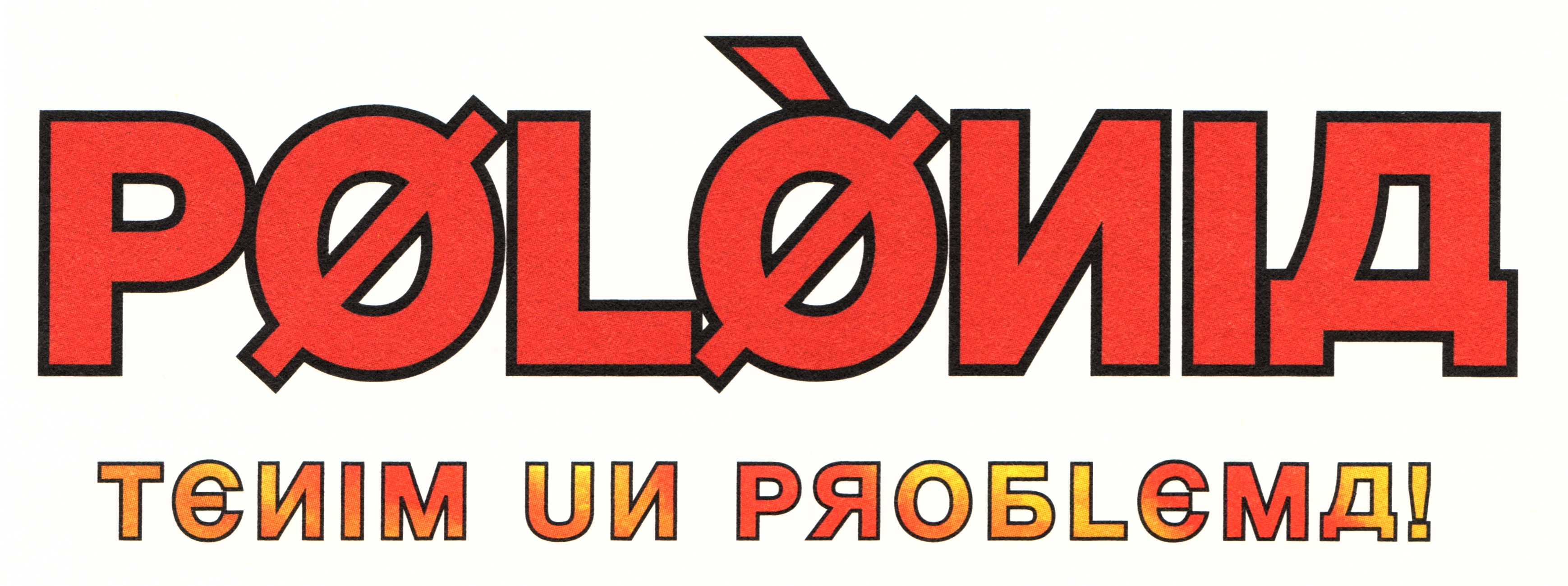 Títol del llibre Polònia - Tenim un problema (pagina de títol).